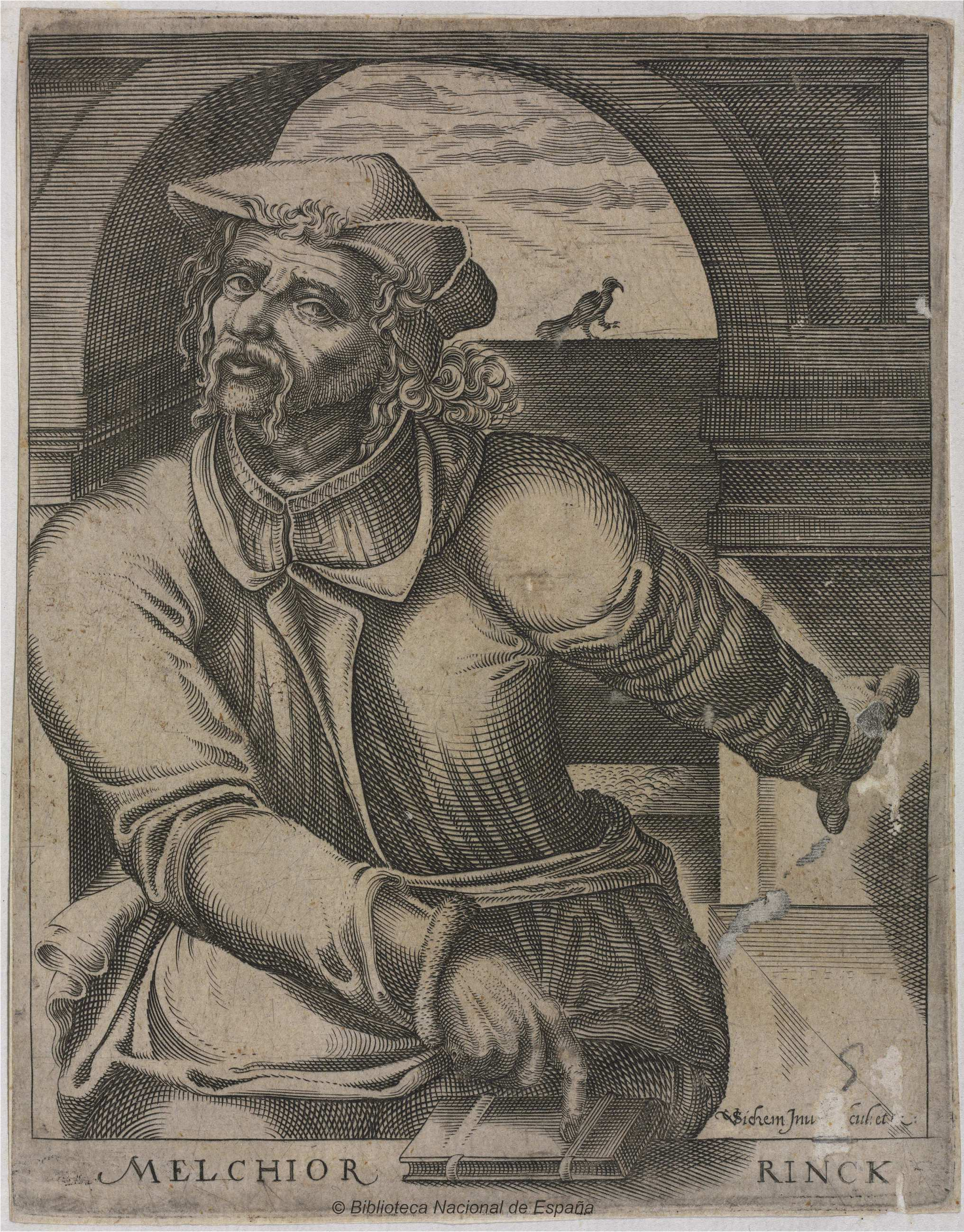 Melchior Rinck-Serie de personajes ilustres firmada por Christoffel van Sichem como inventor y editor. Biblioteca Nacional de España